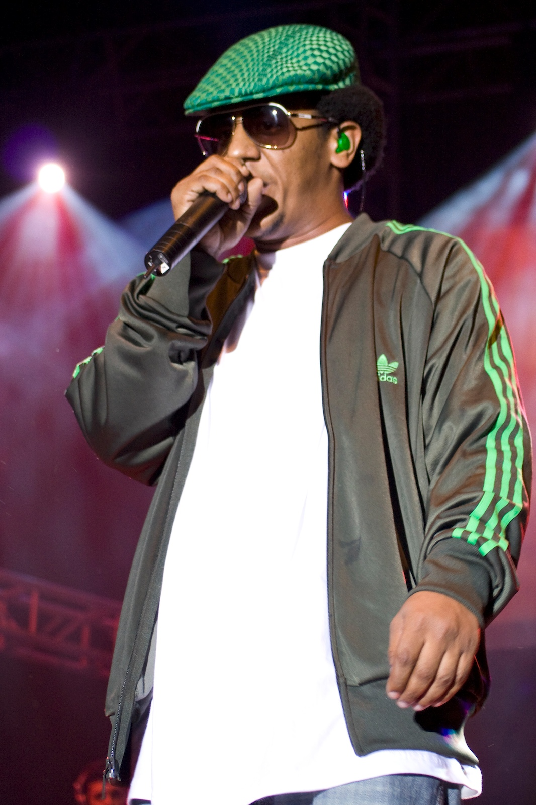 Tego Calderon, Tenerife, Canarias